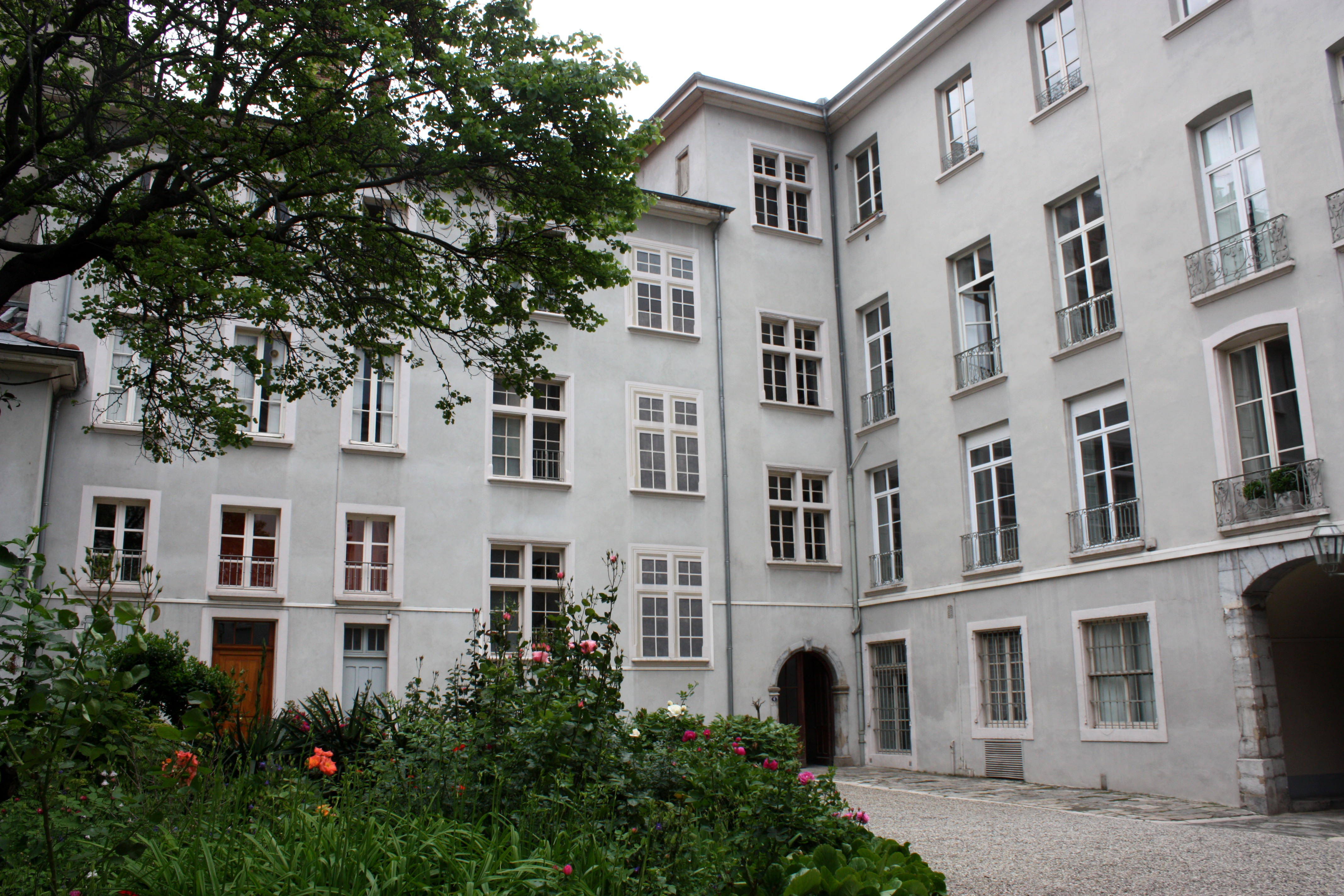 Cour de l'Hôtel de la Première présidence (XVIIe) , rue Voltaire, Grenoble, France